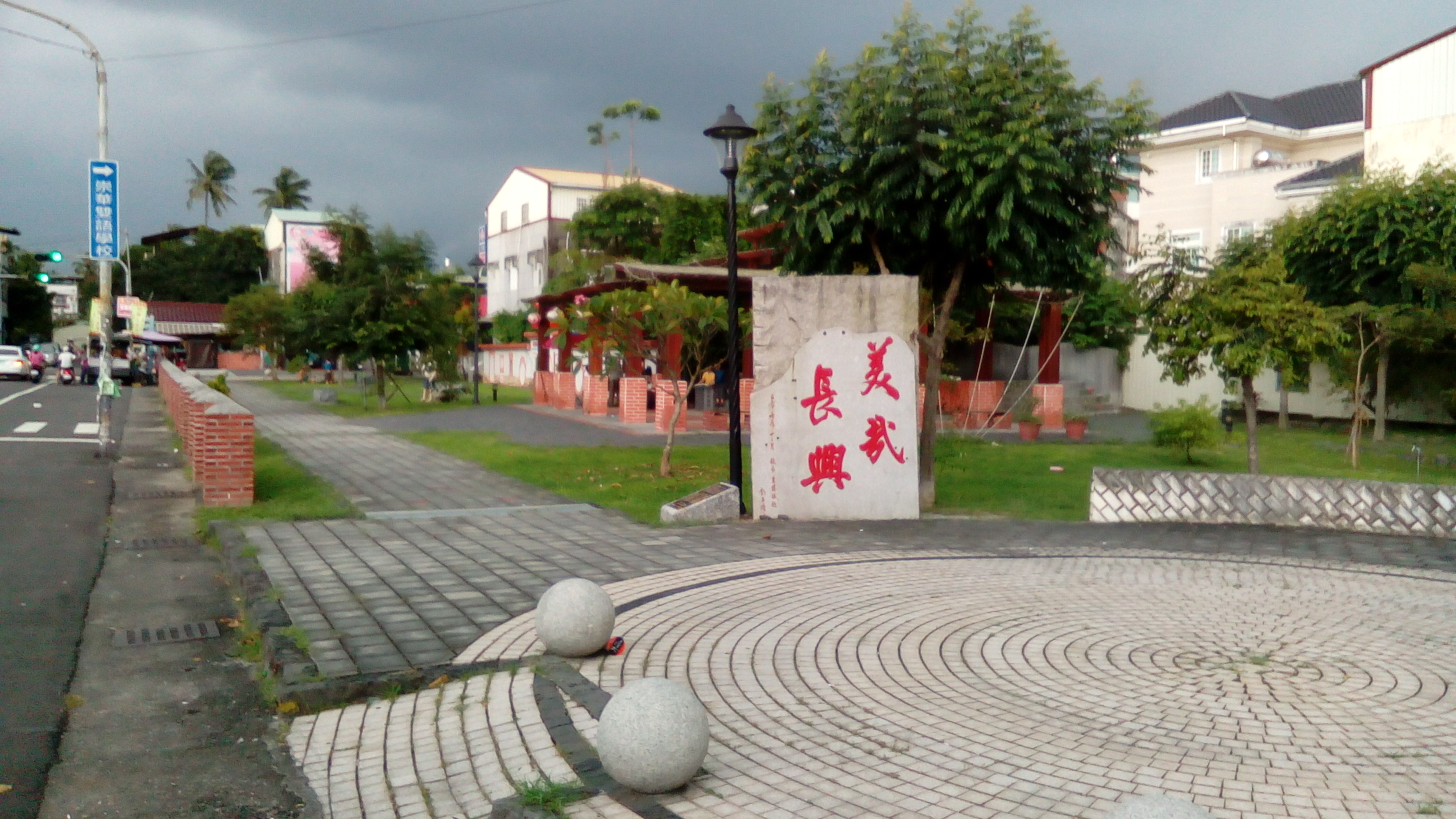 位於長治市區 長興國小前